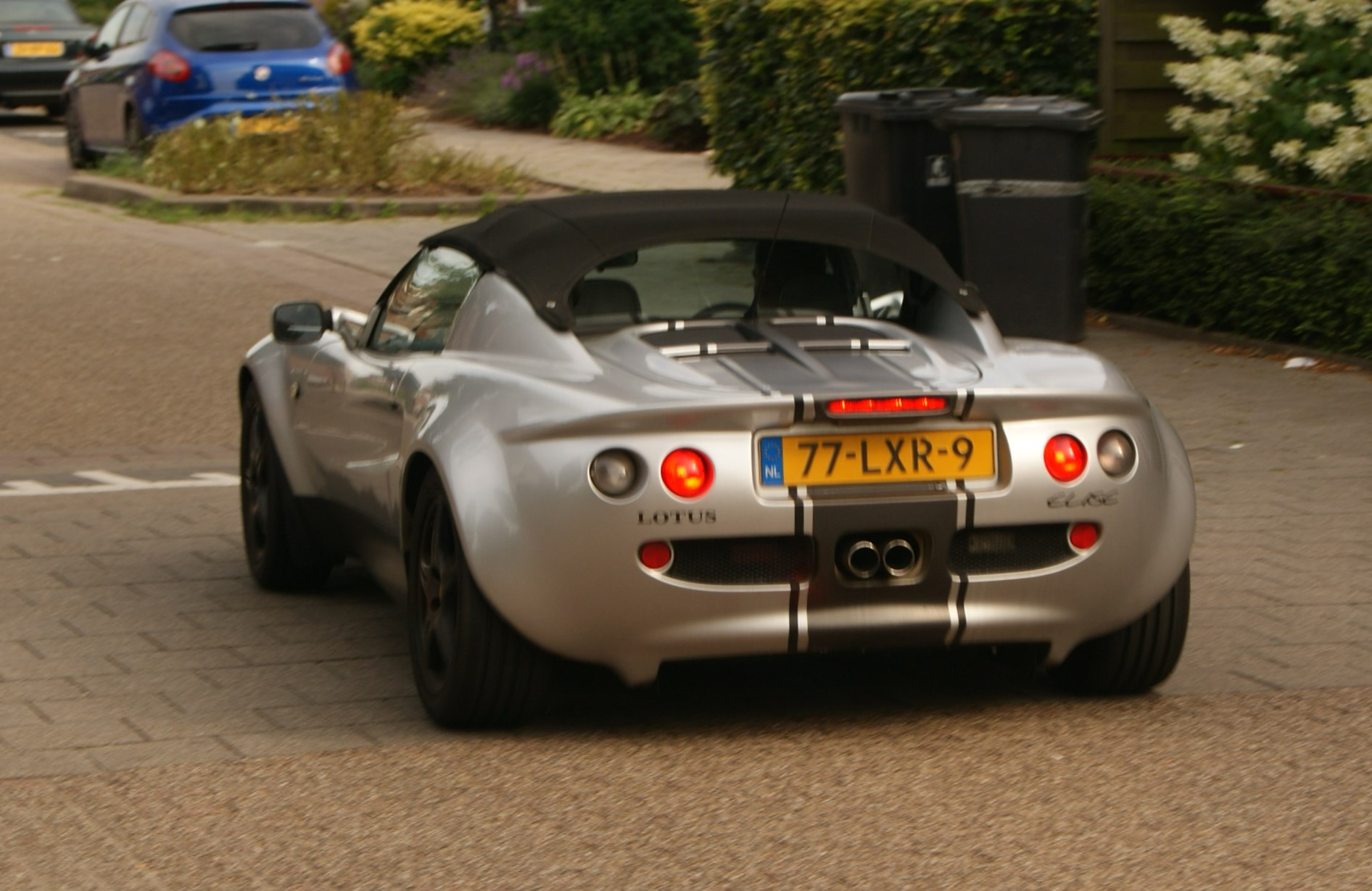 77-LXR-9